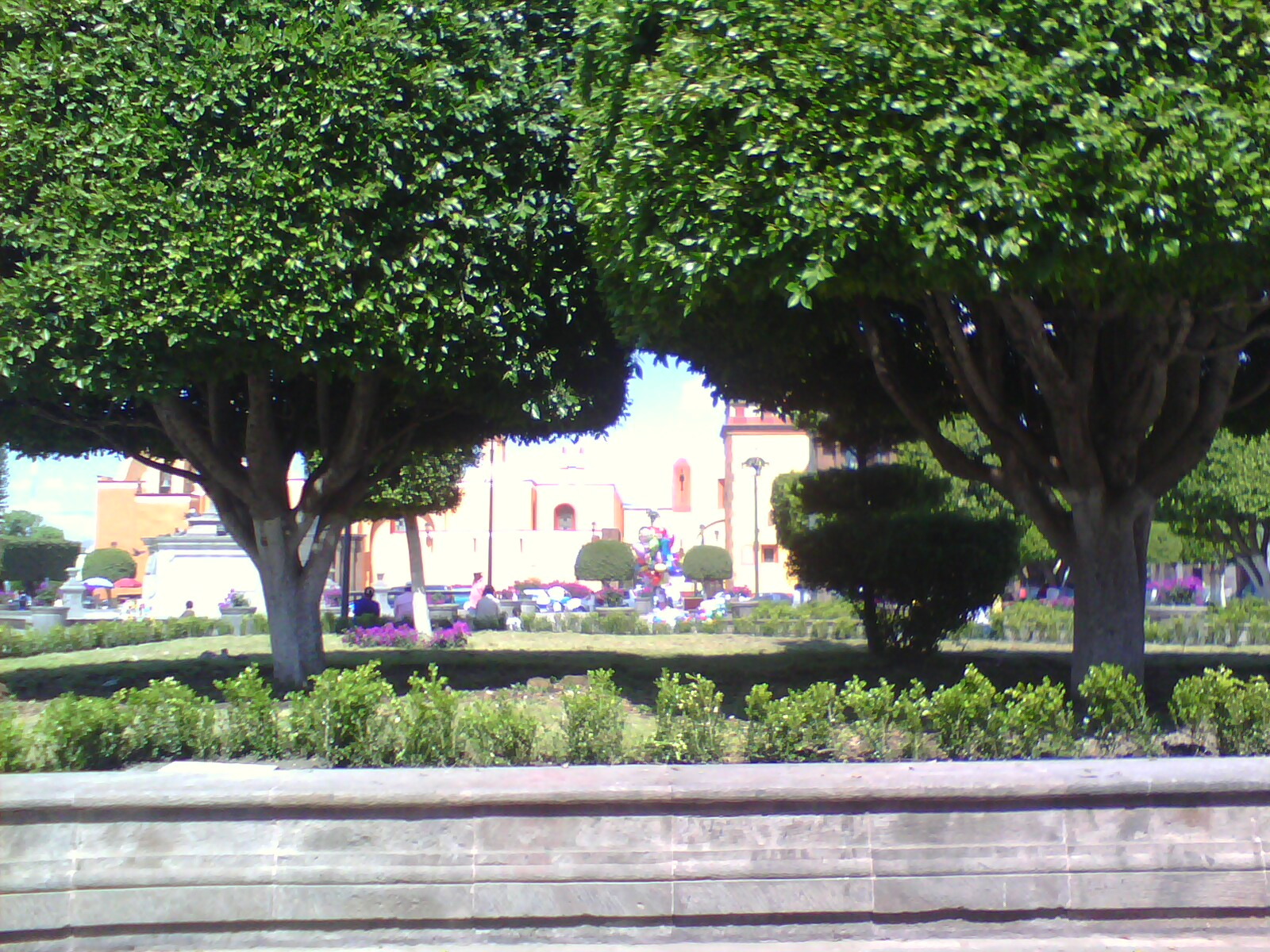 Plaza principal